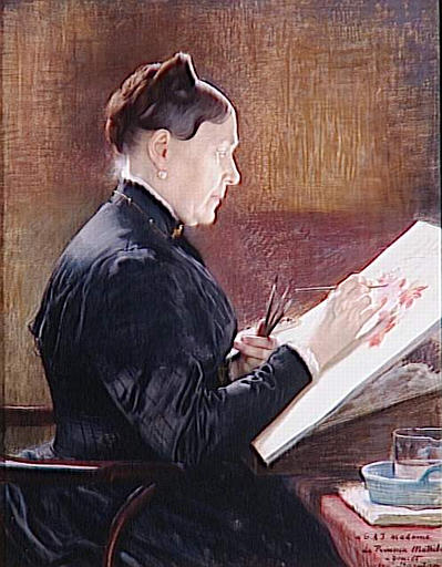 La princesse Mathilde Laetitia Wilhelmine Bonaparte (1820-1904)